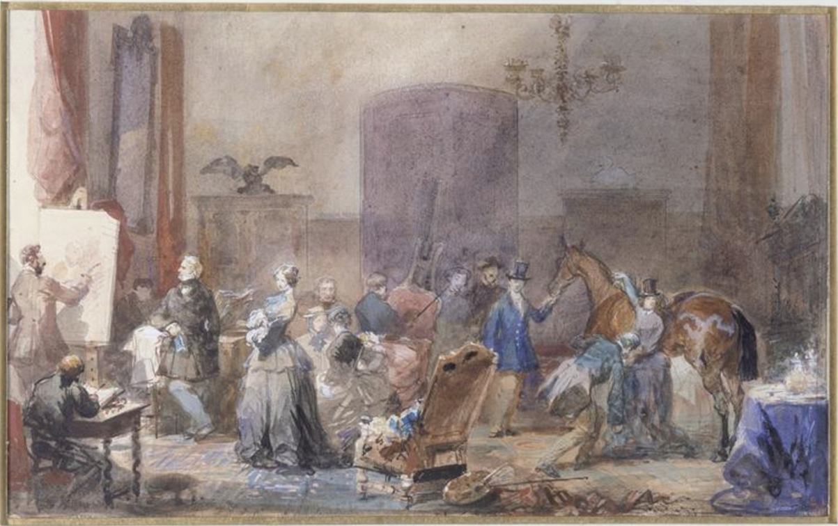 « Cette aquarelle représente la bibliothèque de Châalis du temps de mme Vatry. M. thiers pose pour Roger de Scitivaux et Anatole de Scitivaux; Melle Dufrasne debout les regarde, et Mme Ed. Haingerlot pose appuyée sur son cheval » description faite par Nélie Jacquemart.